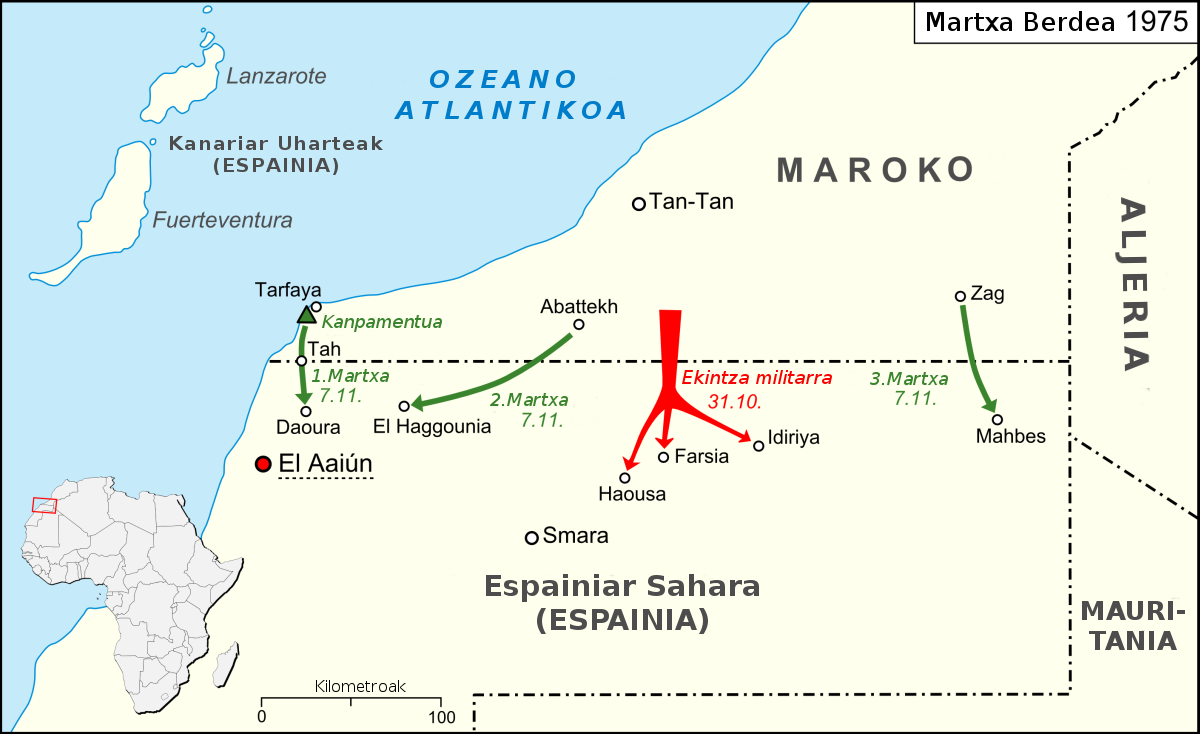 1975eko Martxa Berdea.